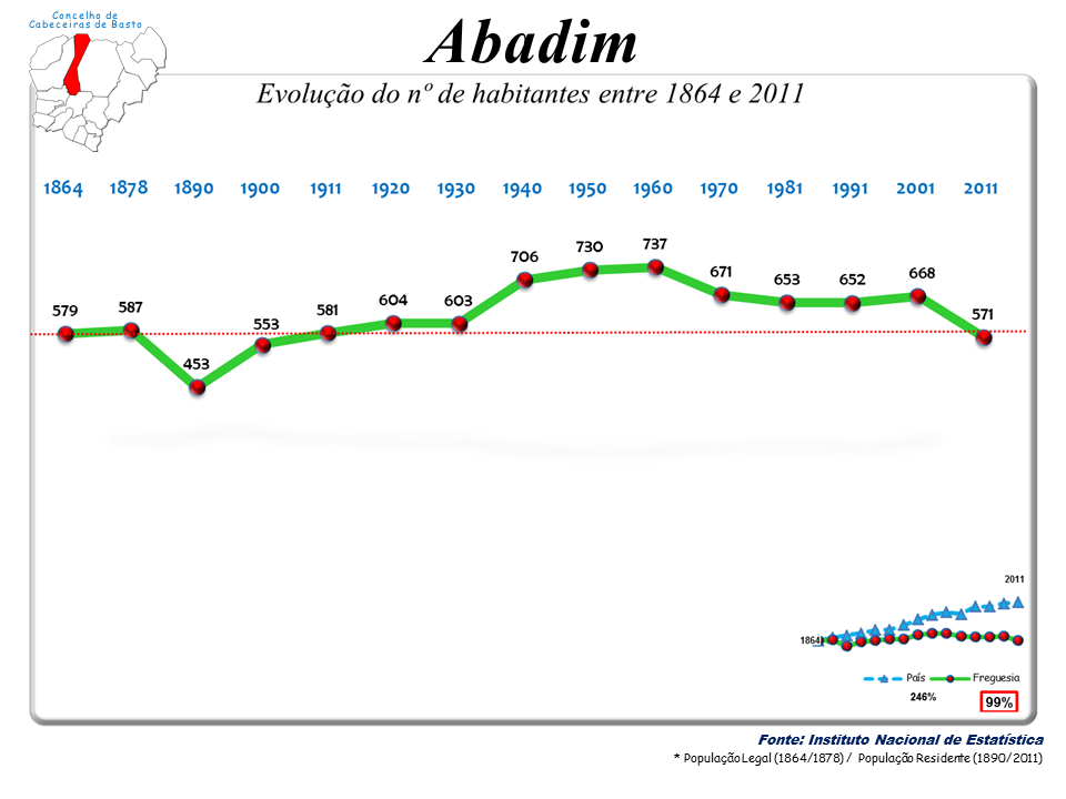 Censos 1864/2011